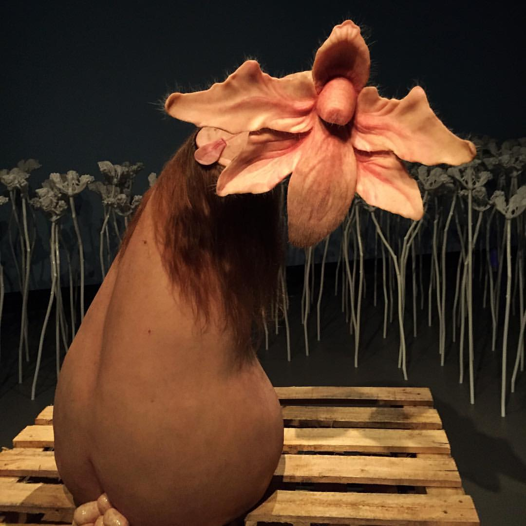 Uma orquídea viva, de carne, osso e pele, com órgãos animais, e que bota ovos. Obra da artista australiana Patricia Piccinini.